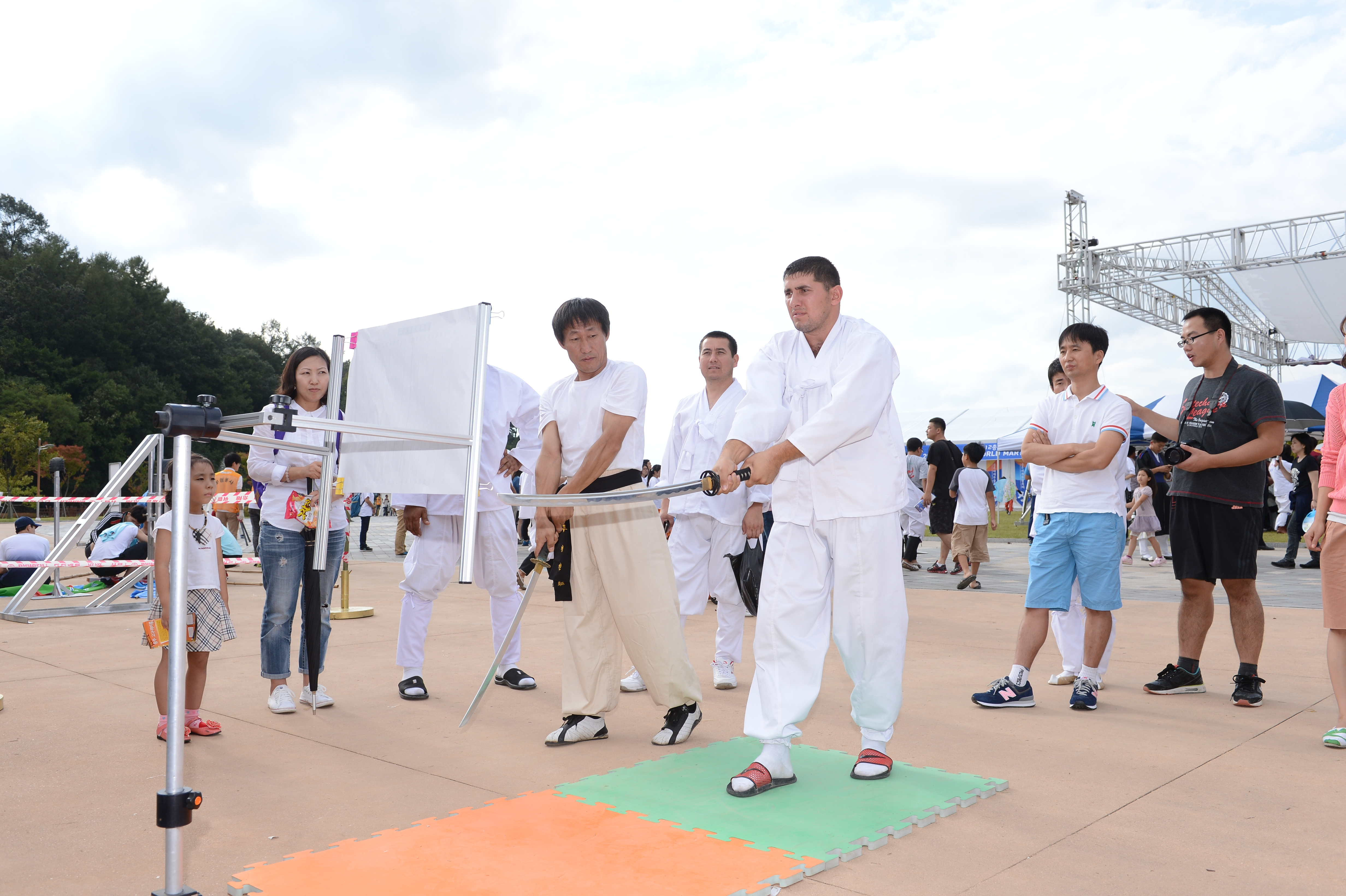 전통무술 배워보기 체험